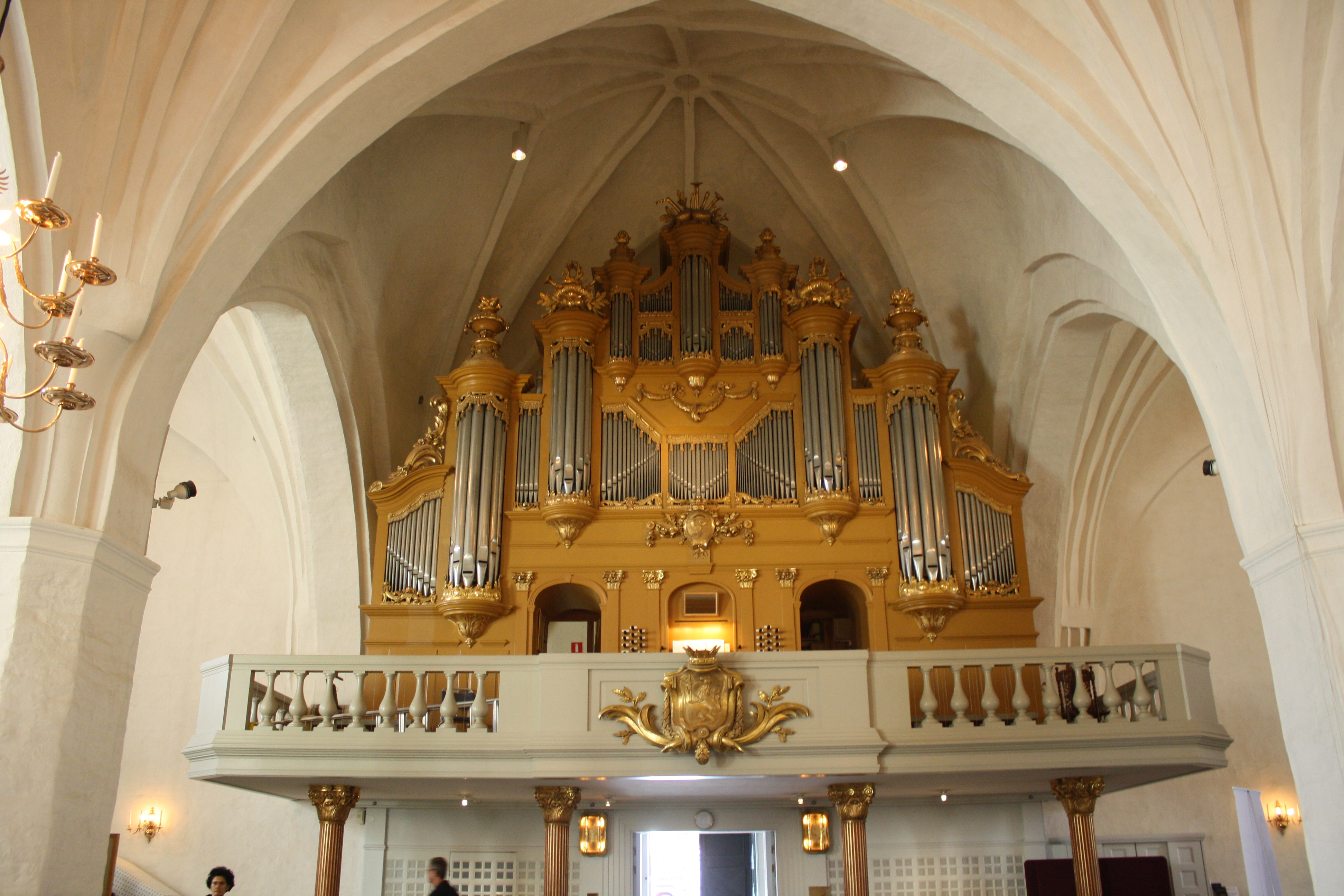 Орган находится над главным входом в собор. Чтобы увидеть его нужно пройти в собор и развернуться назад.